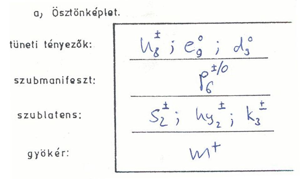 Szondi-teszt, saját tesztfelvétel, a vsz. engedélyével